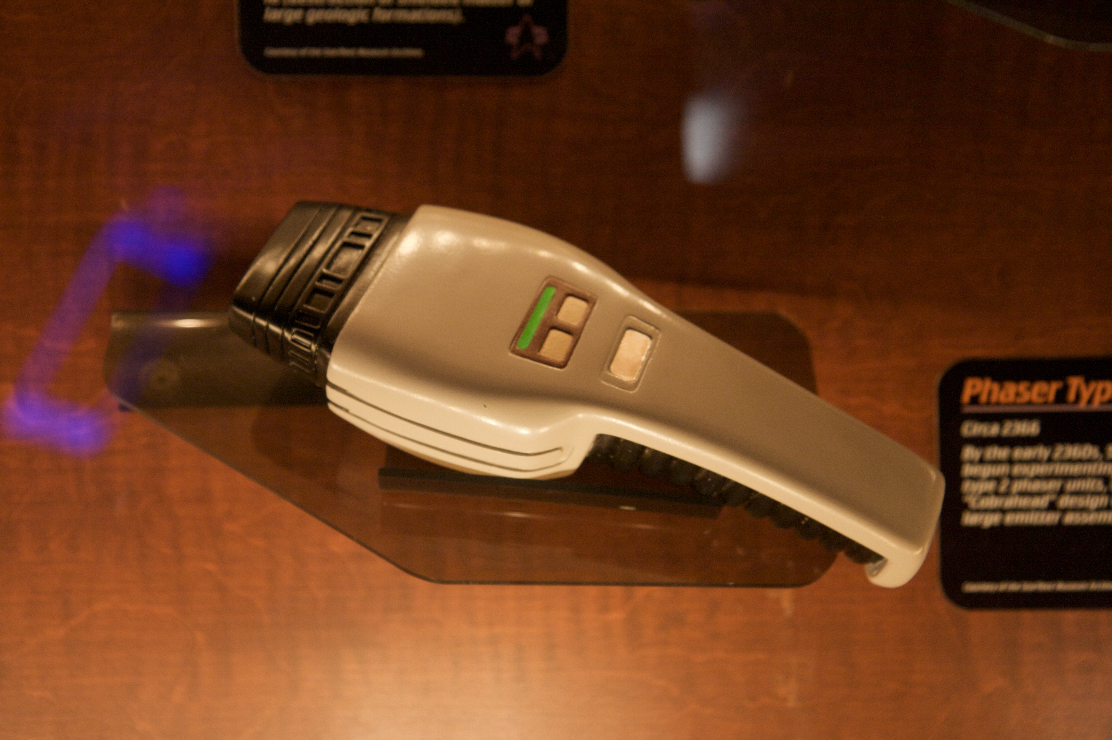 star trek phaser model